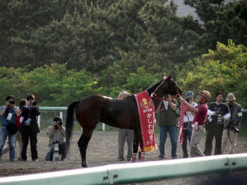 ストロングブラッド（第17回かしわ記念）